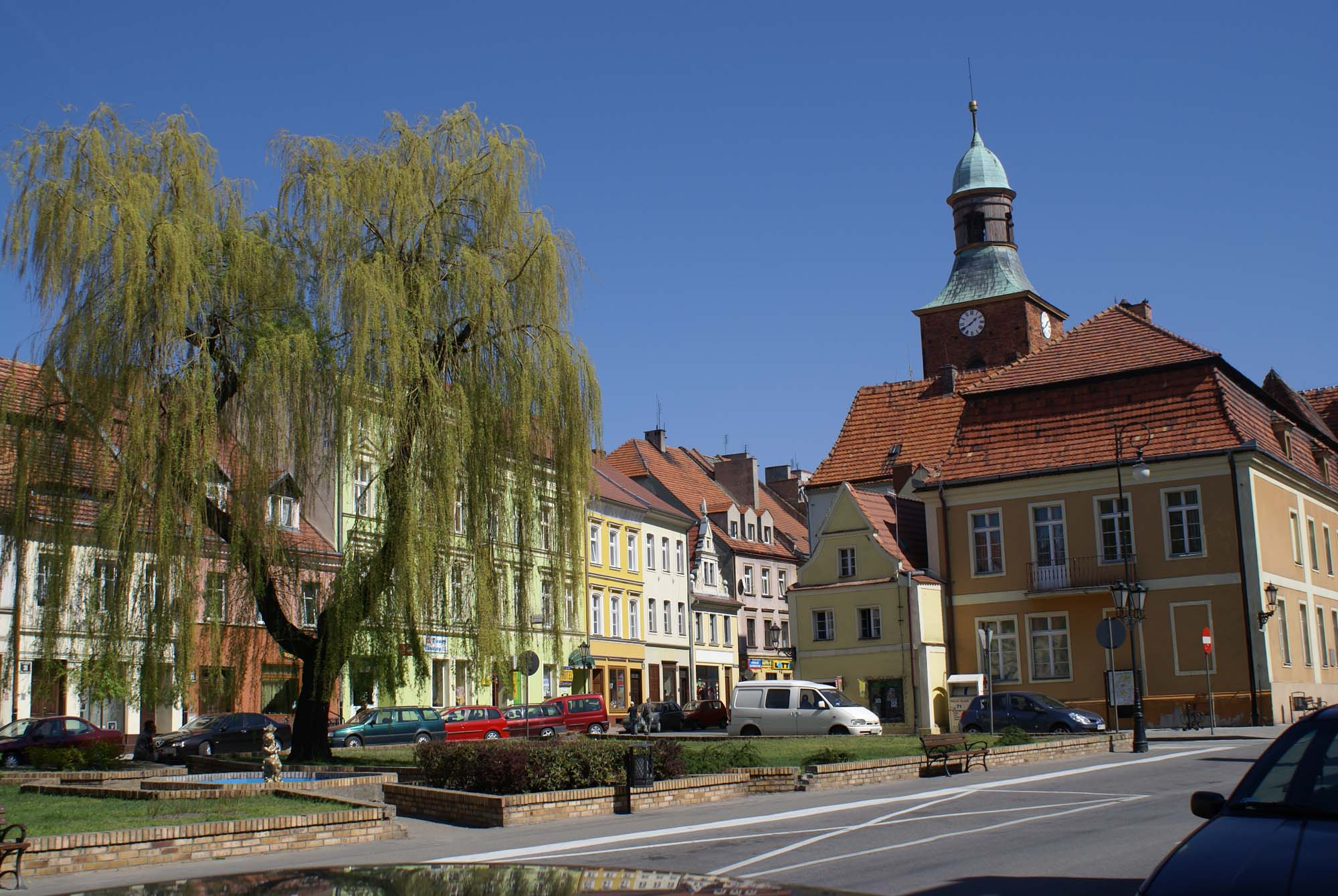 Środa Śląska, ośrodek historyczny miasta